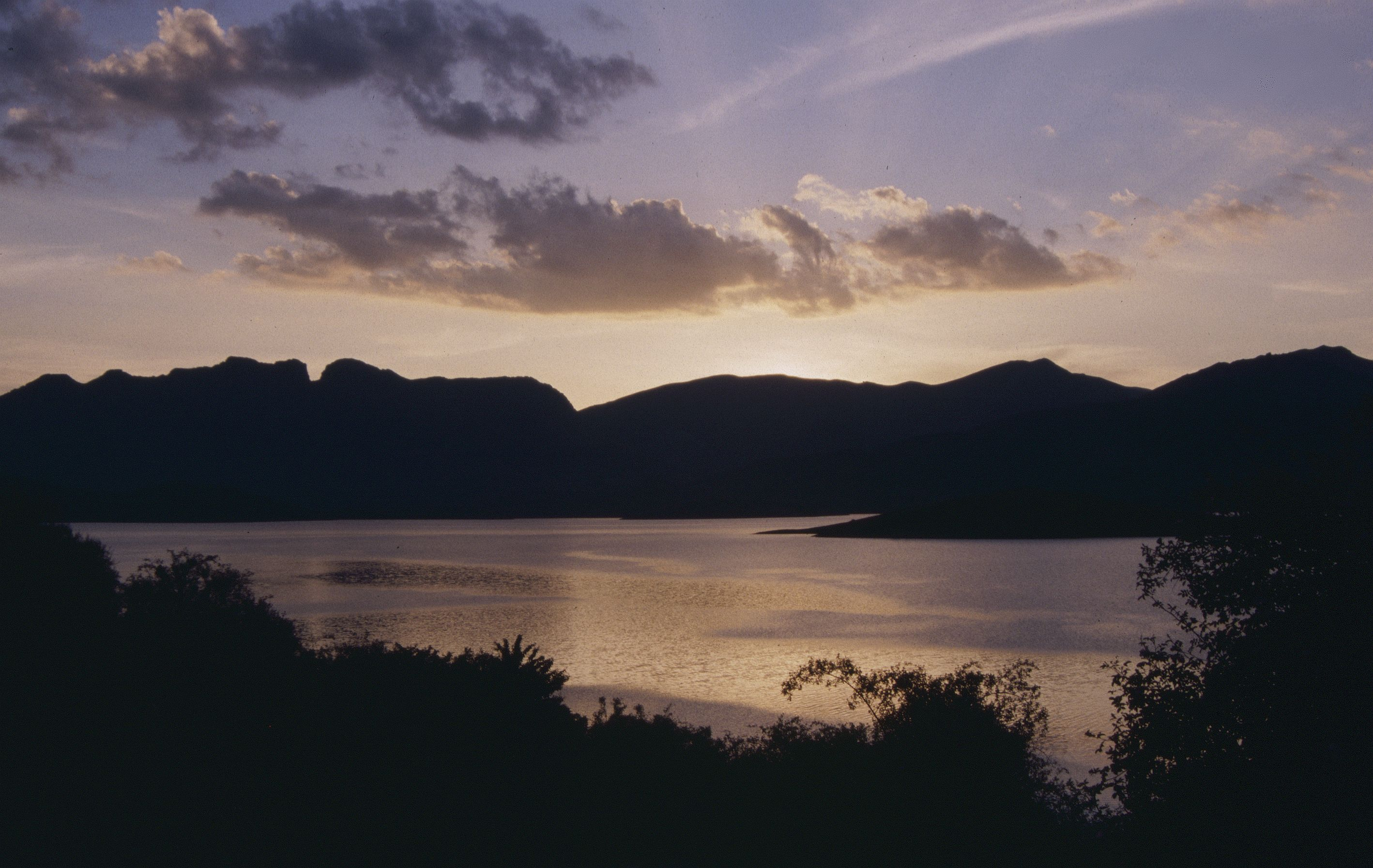 Embalse del Porma, Kantabrische Kordilleren